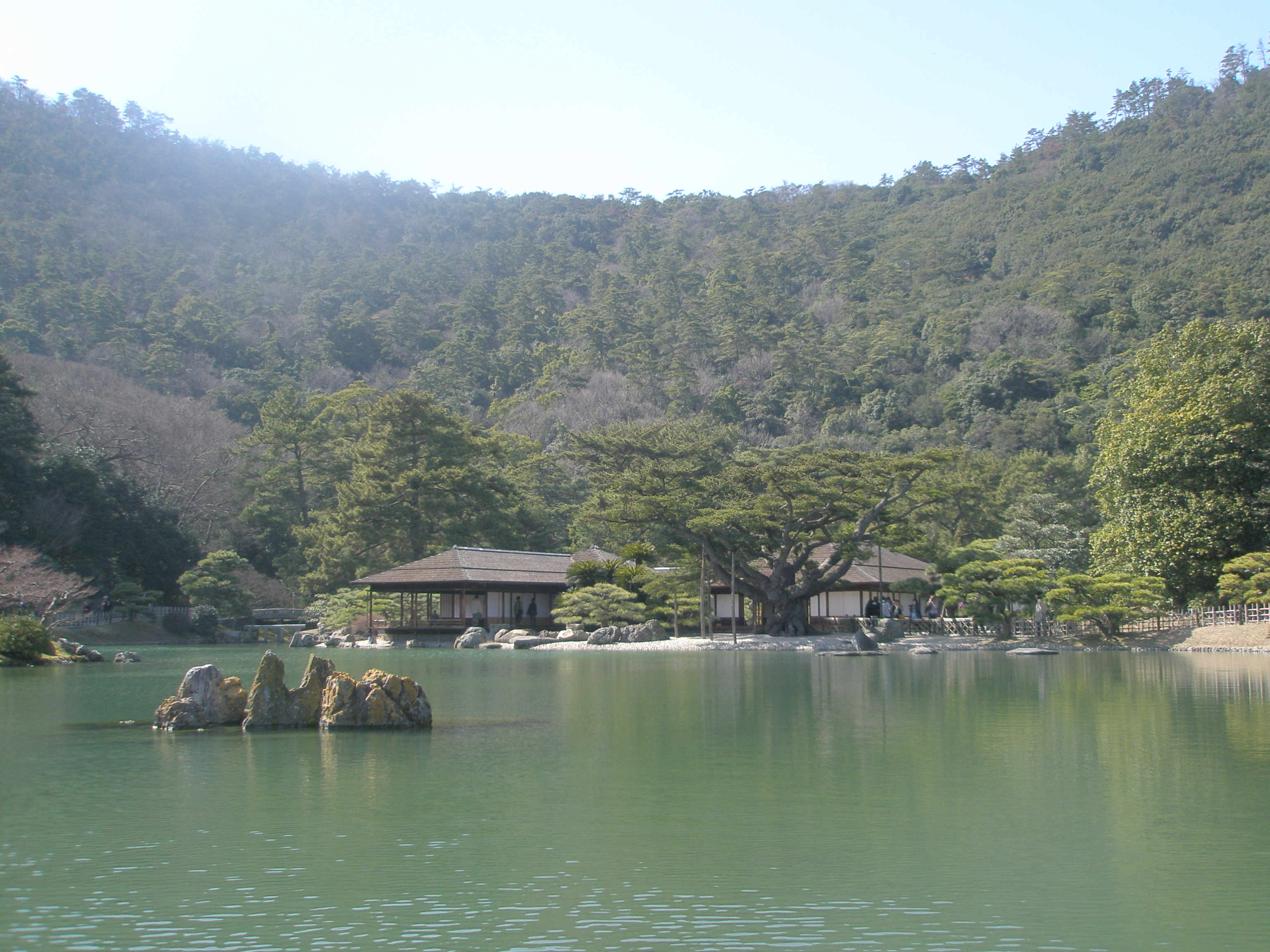 南湖で和船より掬月亭を望む